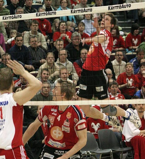 Finland volleyball player Joni Mikkonen season 2008